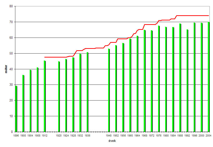 A férfi diszkoszvetés olimpiai bajnokainak eredményei olimpiánként (zöld oszlopok) és a világrekord változása (piros vonal)